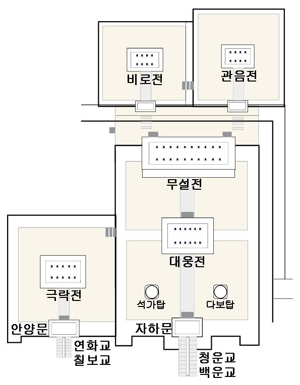 사용자 아흔의 개인작품, 불국사 가람도